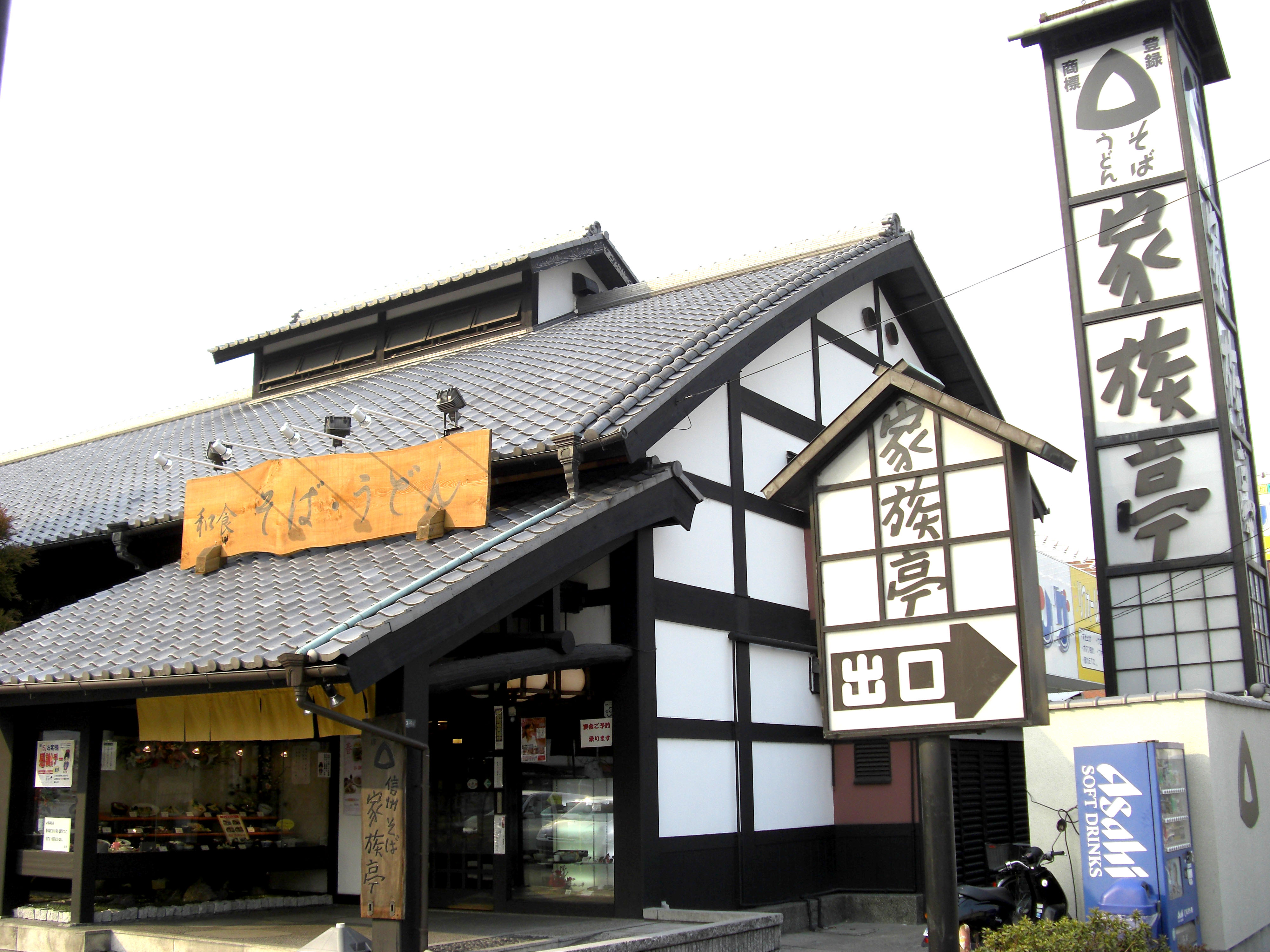 Kazukutei Ibaraki,Kamihozumi Ibarakishi-shi Osaka Japan.